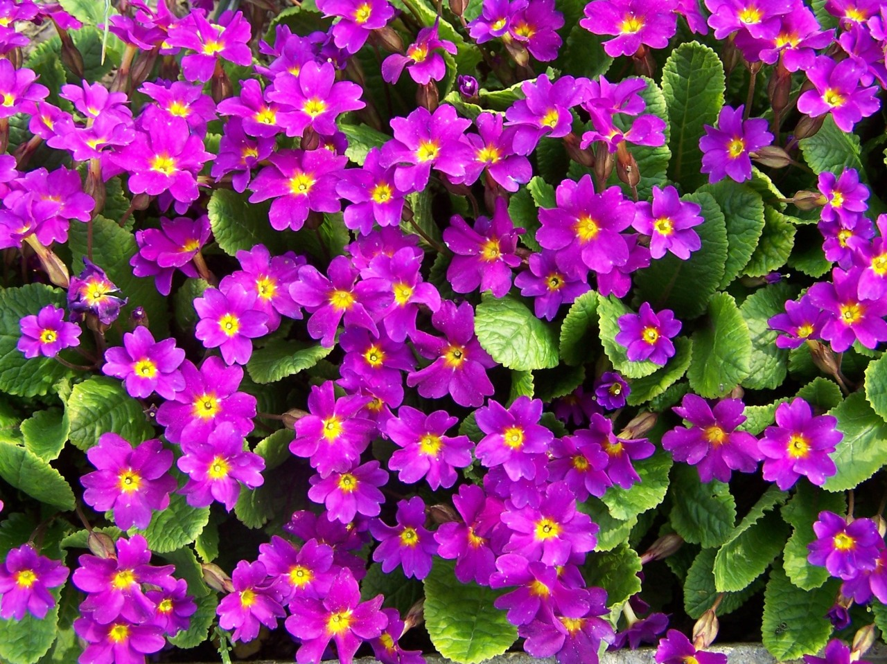 Primula vulgaris (kultyvar)